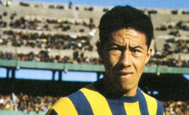 Jorge José González